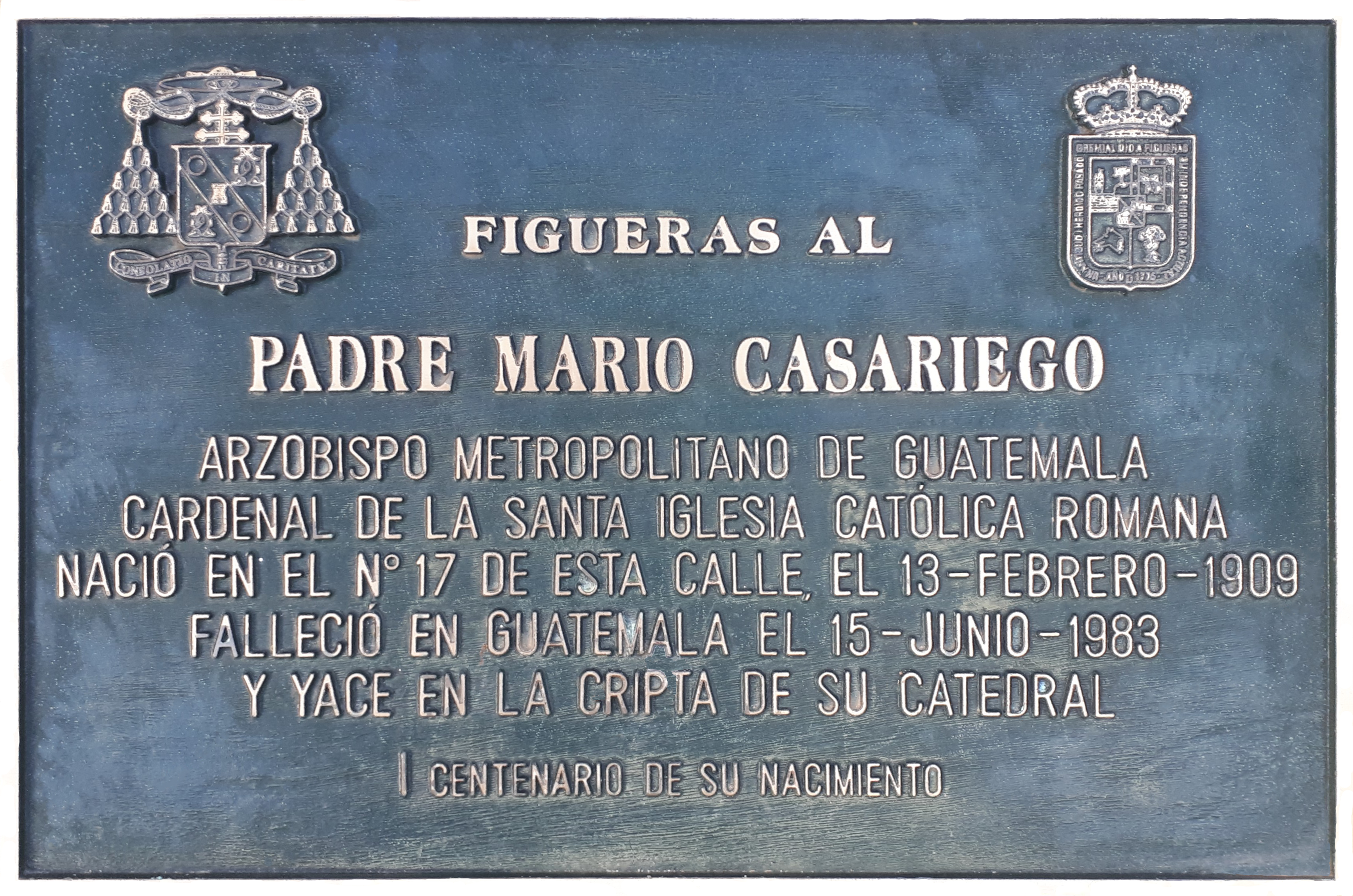 Placa en conmemoración del primer centenario del nacimiento del padre Mario Casariego en Figueras (Asturias - España).